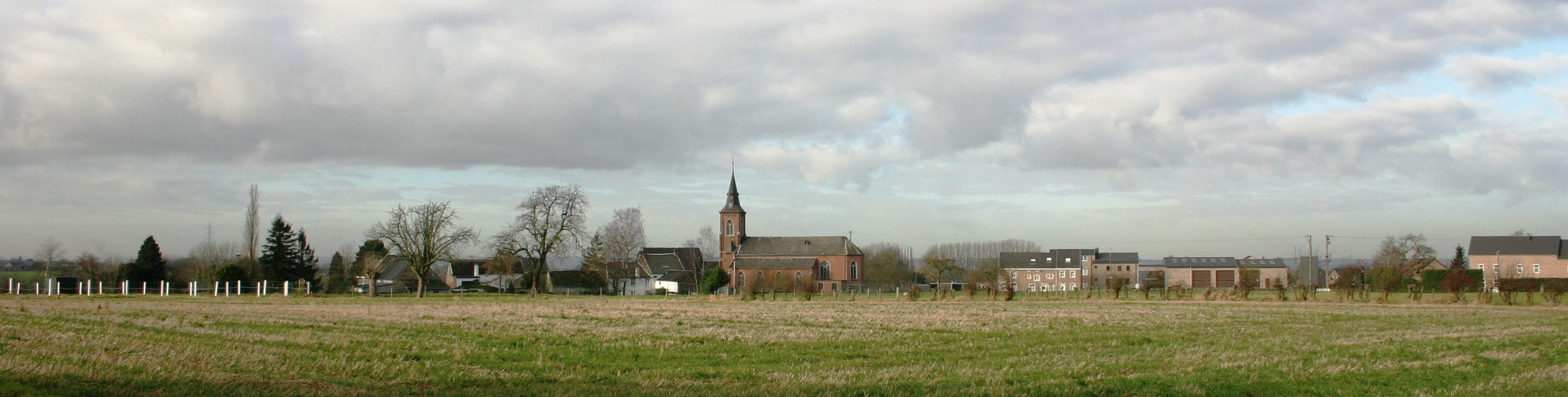 Tignée vun Oste gesinn.